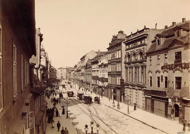 Příkopy byly oblíbeným pražským (německým) korzem a místem luxusních obchodů.